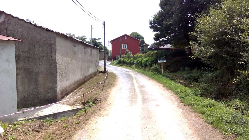 Vista do Espido, Curtis.